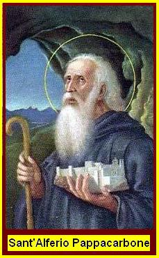 Foto-riproduzione di un dipinto di Autore anonimo del XVII secolo. Abbazia SS. Trinità di Cava de' Tirreni (Italia)